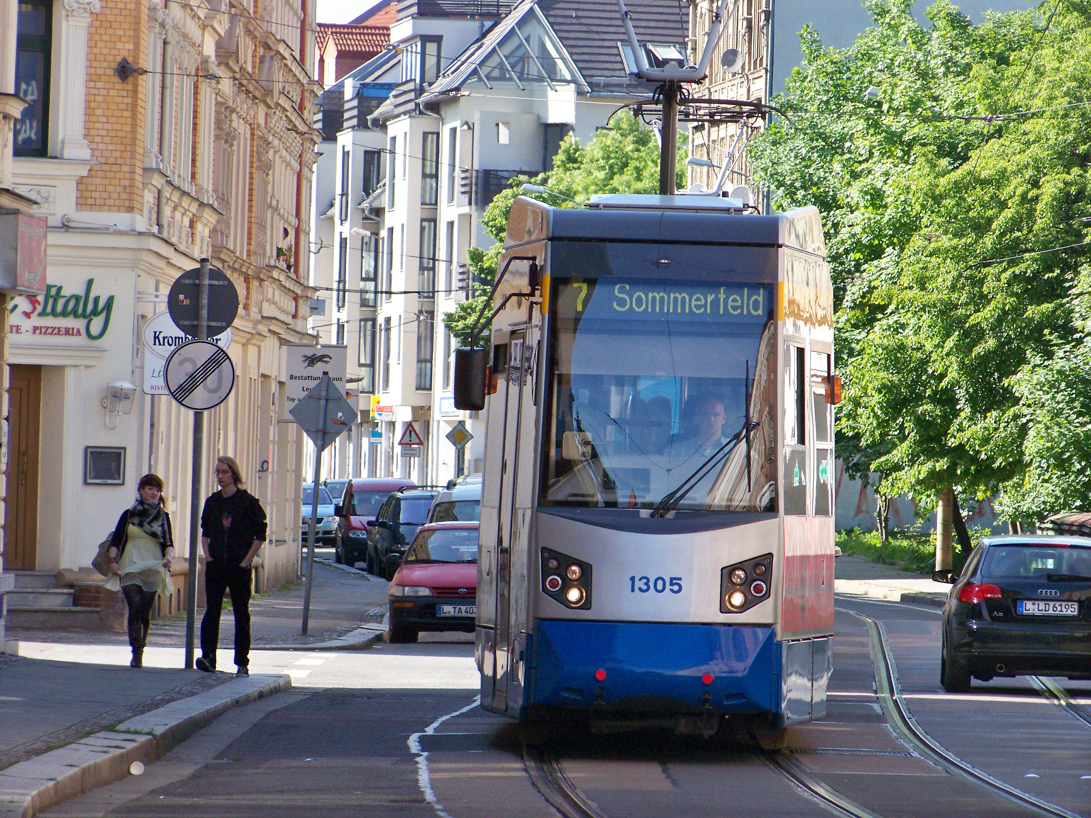 Eine Leoliner-Doppeltraktion der Leipziger Verkehrsbetriebe auf der Linie 7 (Böhlitz-Ehrenberg–Sommerfeld) in der Georg-Schwarz-Straße in Leipzig-Leutzsch vor der Haltsstelle Diakonissenhaus